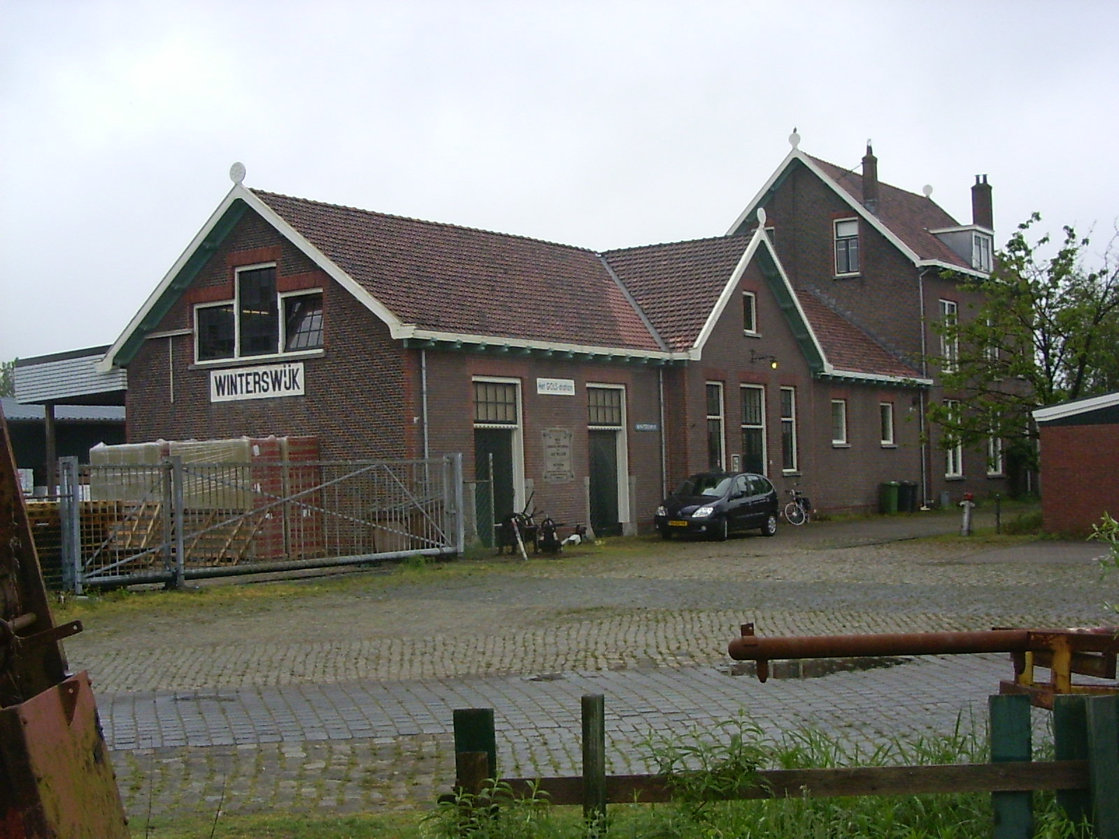 Winterswijk, station GOLS